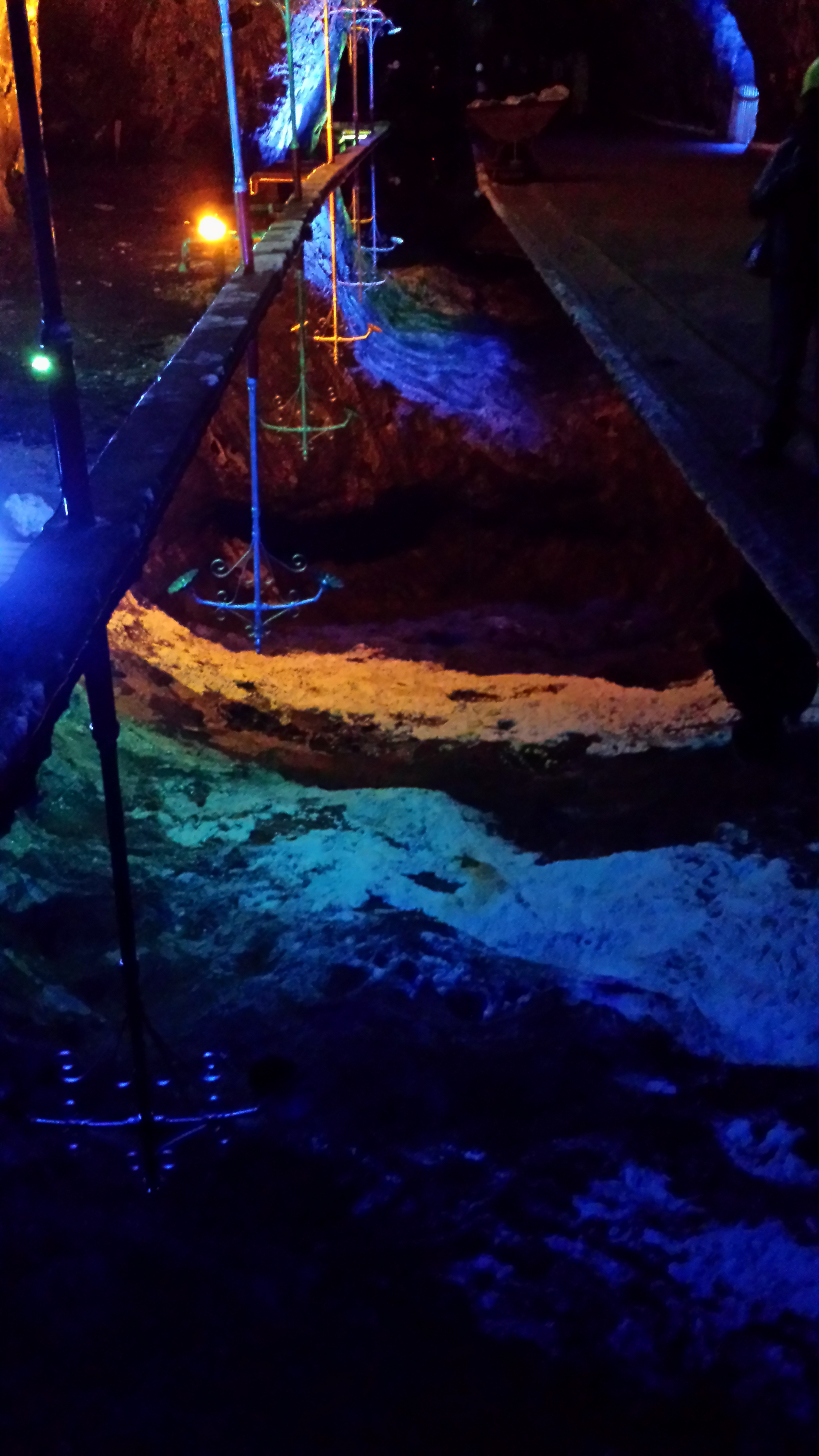 Interior mina de sal, Nemocón, Cundinamarca, Colombia.